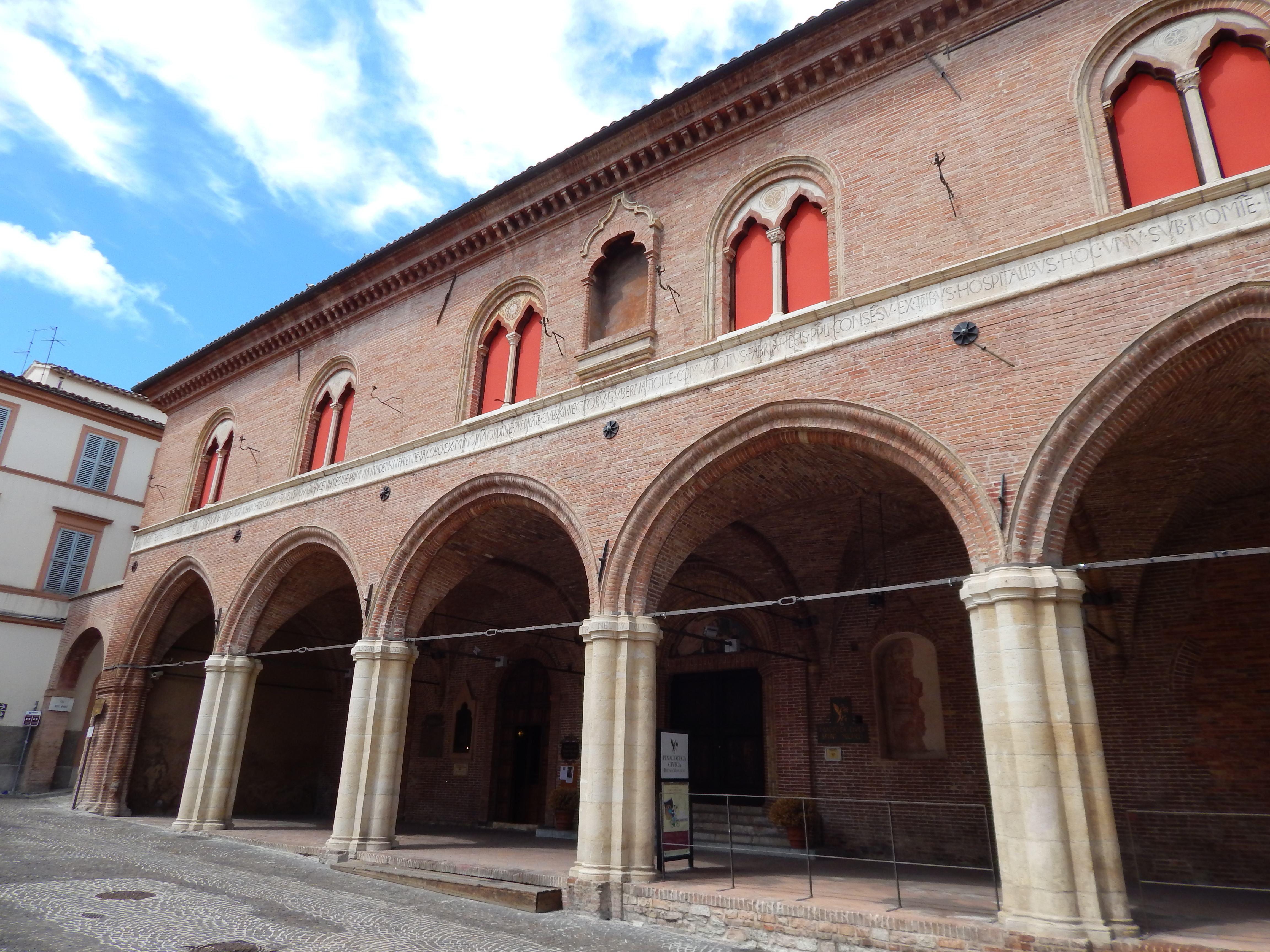 Spedale Santa Maria del Buon Gesù - Pinacoteca civica Bruno Molajoli (esterni e chiostro interno) This is a photo of a monument which is part of cultural heritage of Italy.